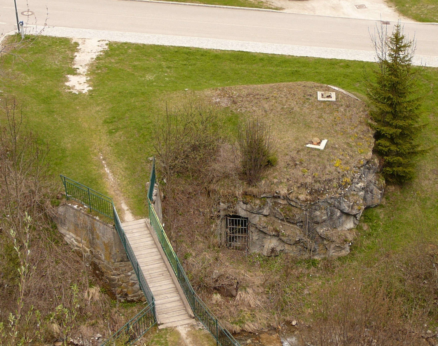 Opera 2 , sbarramento drava